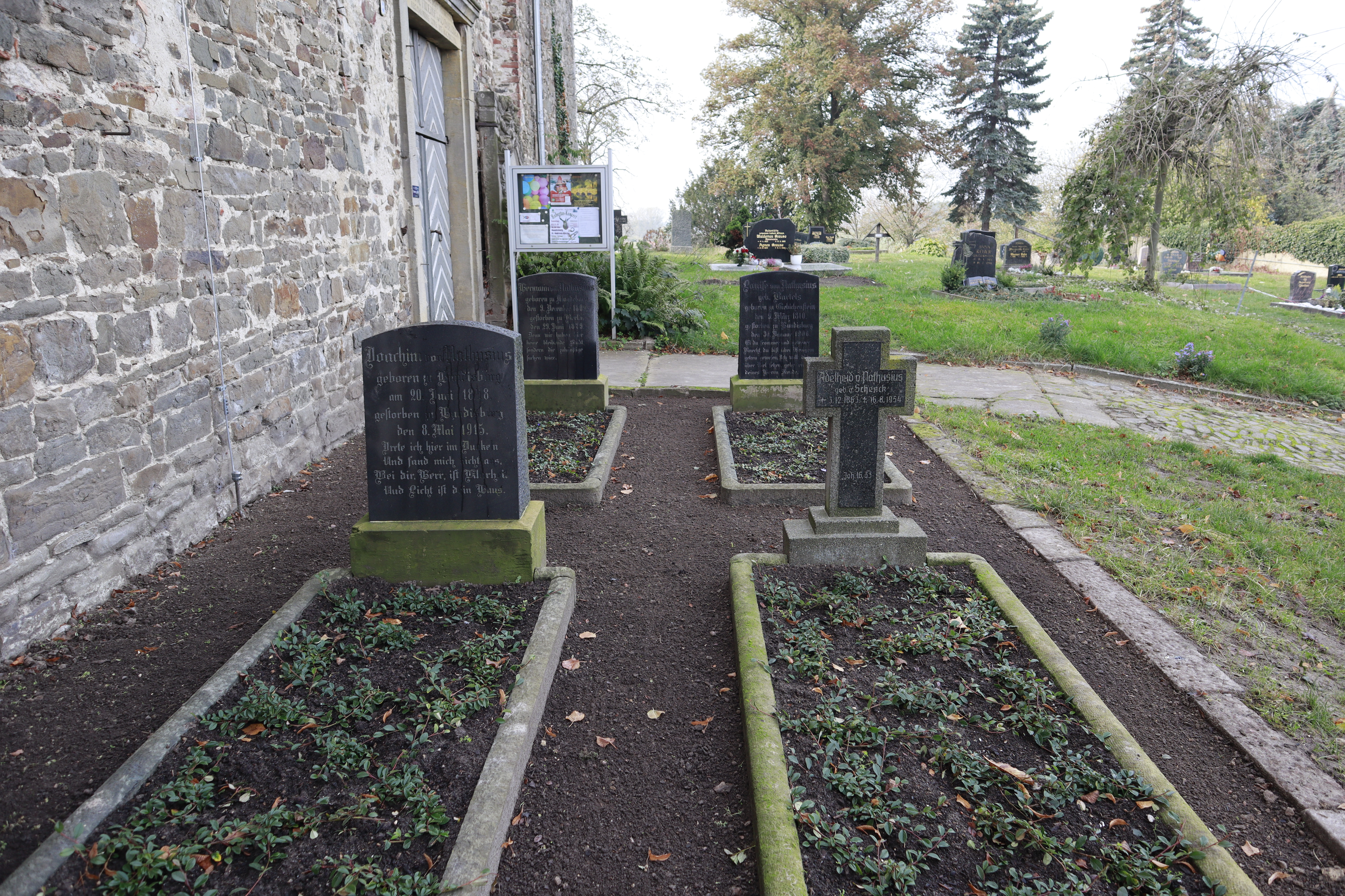 Hundisburg, Andreaskirche, Grabstätte der Familie von Nathusius